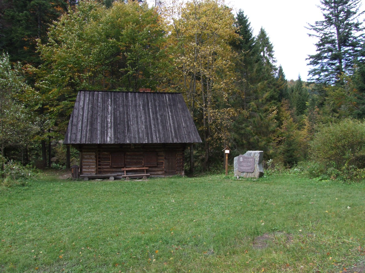 Polana Papieżówka w Gorcach